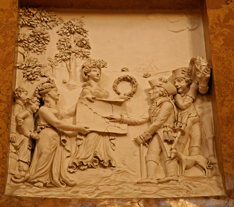 Pałac w Lubostroniu. Płaskorzeźba w sali rotudnowej. Marianna Skórzewska przedstawia Fryderykowi Wielkiemu plany budowy Kanału Bydgoskiego. Autor: Michał "Cronwood" Babilas